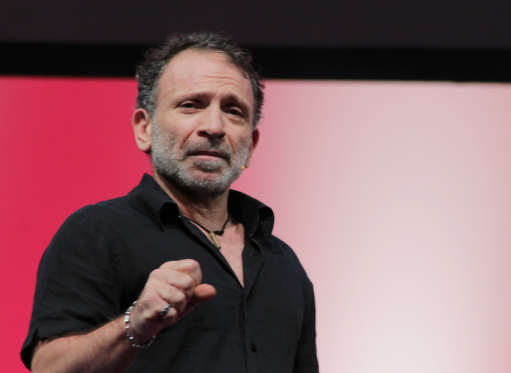 portret